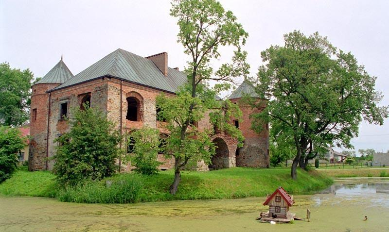 Ruiny obronnego dworu w Modliszewicach